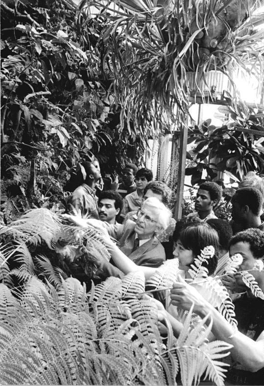 Leipzig, Gaststudenten im Tropenhaus ADN-ZB Grubitzsch 10.11.89 Leipzig: Eine vertraute Umgebung mit den entsprechenden Temperaturen finden Studenten aus Äthiopien, Angola, Nikaragua, Mocambique und anderen Ländern im Botanischen Garten der Leipziger Karl-Marx-Universität vor. Der Lehrbeauftragte Karl-Heinz Kaletta vom Institut für Tropische Landwirtschaft charakterisiert verschiedene Pflanzenarten und ihre Besonderheiten. Die jungen Ausländer -zur Zeit sind es rund 90 aus über 20 Ländern- werden in Leipzig gemeinsam mit DDR-Studenten als Diplomagraringenieure ausgebildet.